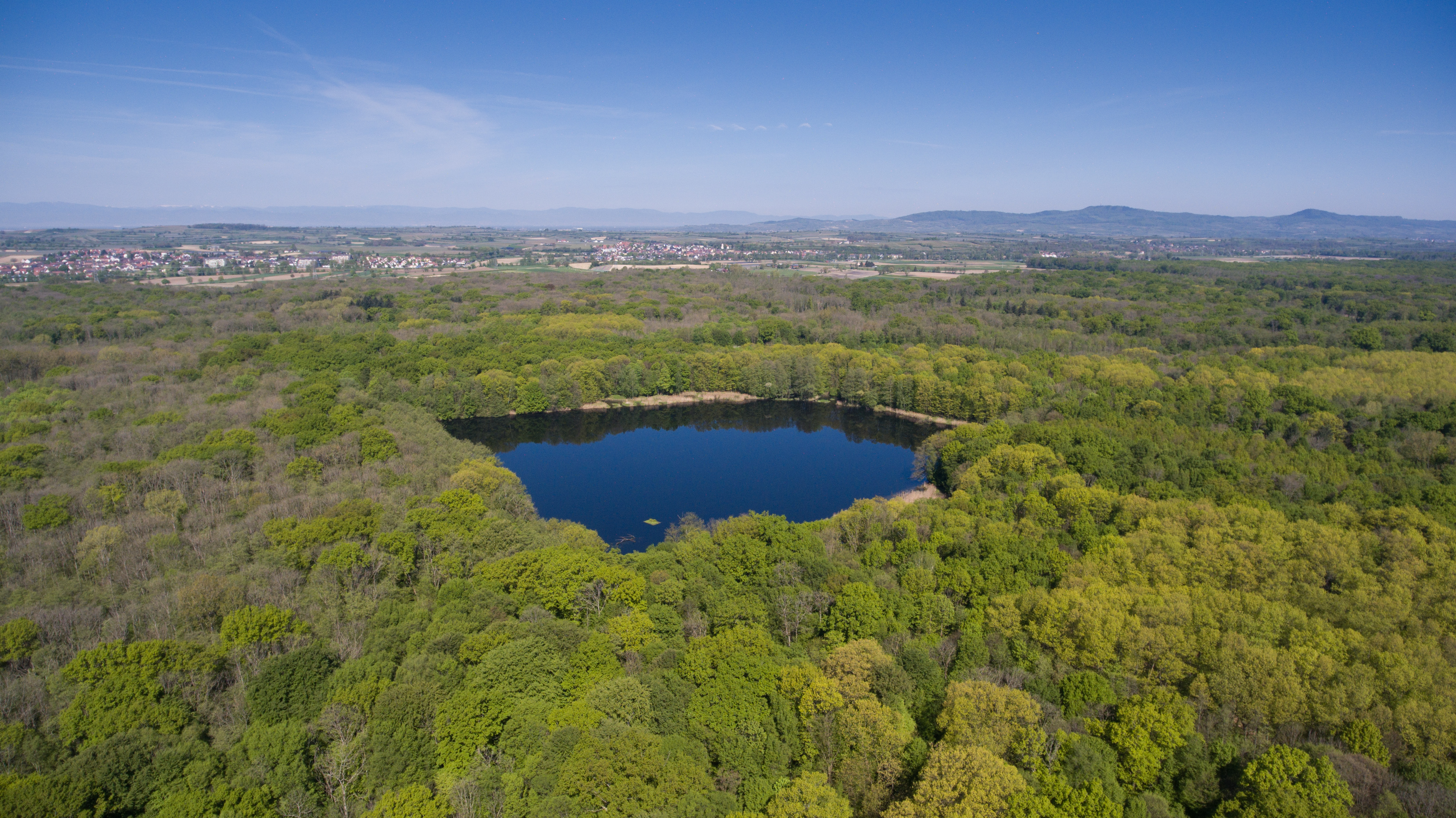 Luftaufnahme: Blick übers Naturschutzgebiet „Arlesheimersee“ (NSG 3.070) mit dem Arlesheimer See in der Bildmitte; das NSG liegt im größeren FFH-Gebiet „Breisgau“